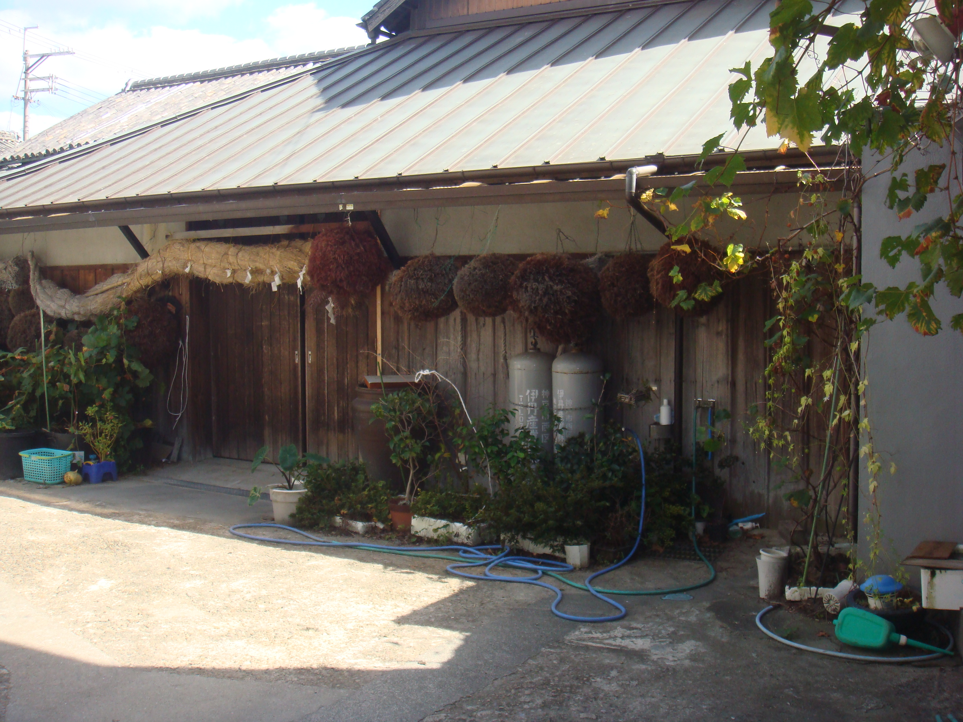 西海酒造の全景